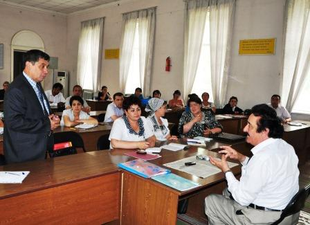 Обсуждение. Профессор Р. Рахимов ХГУ им. Б. Гафурова, Г. Худжанд